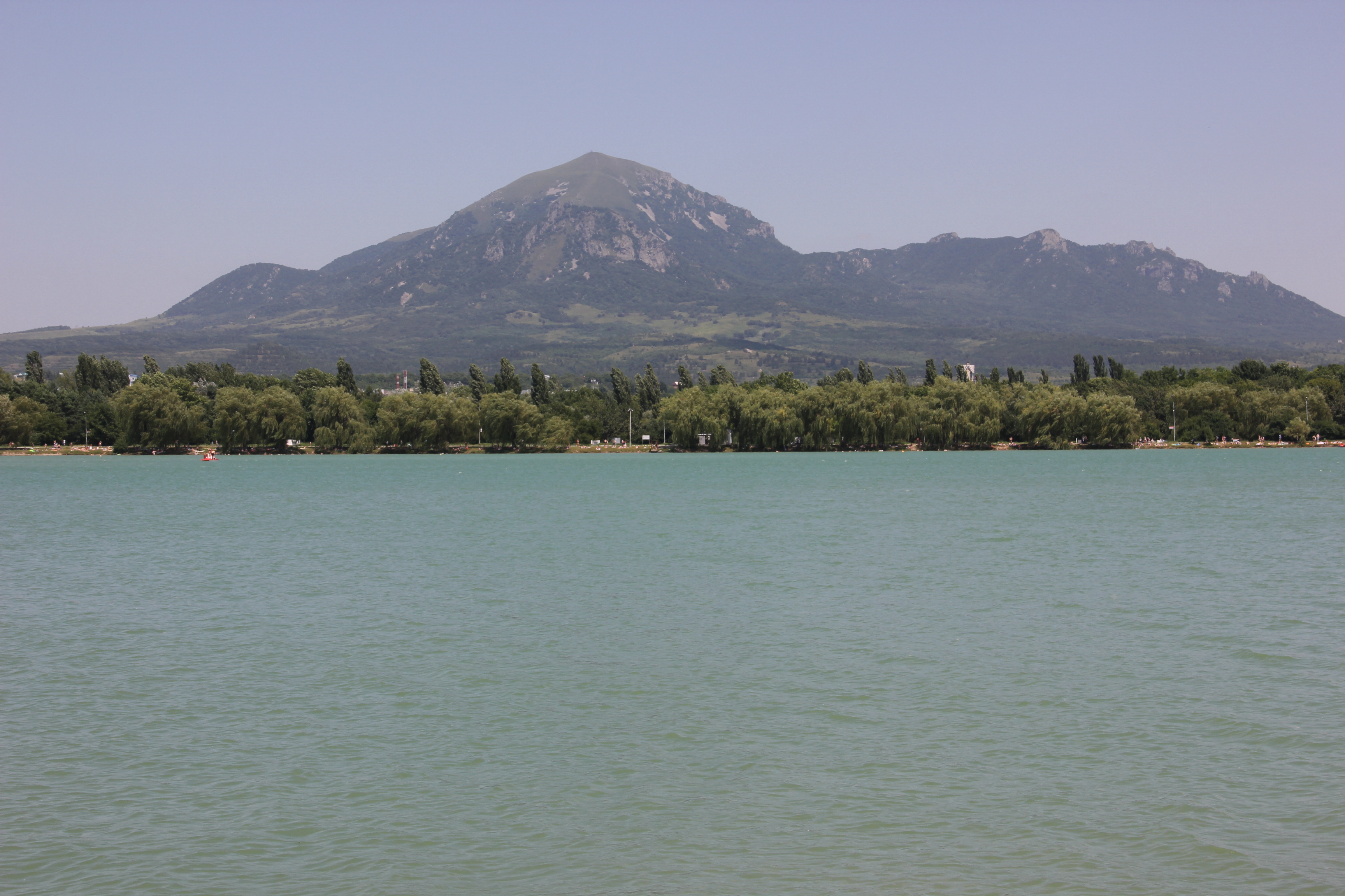 Вид на гору Бештаус Новопятигорского озера. Снимок сделан с дальней (дикой) стороны озера.